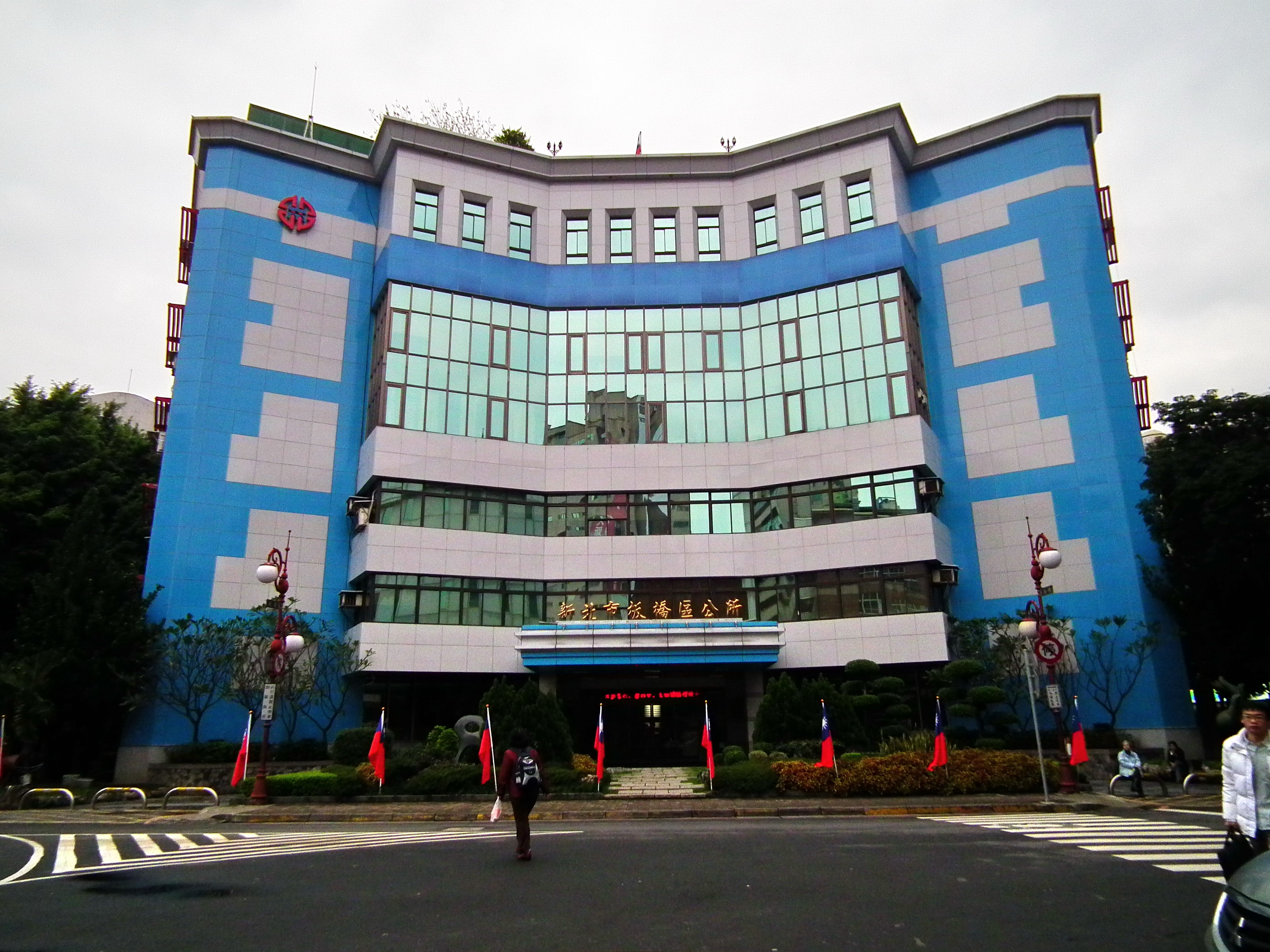 新北市板橋區公所，位於新北市板橋區府中路30號。